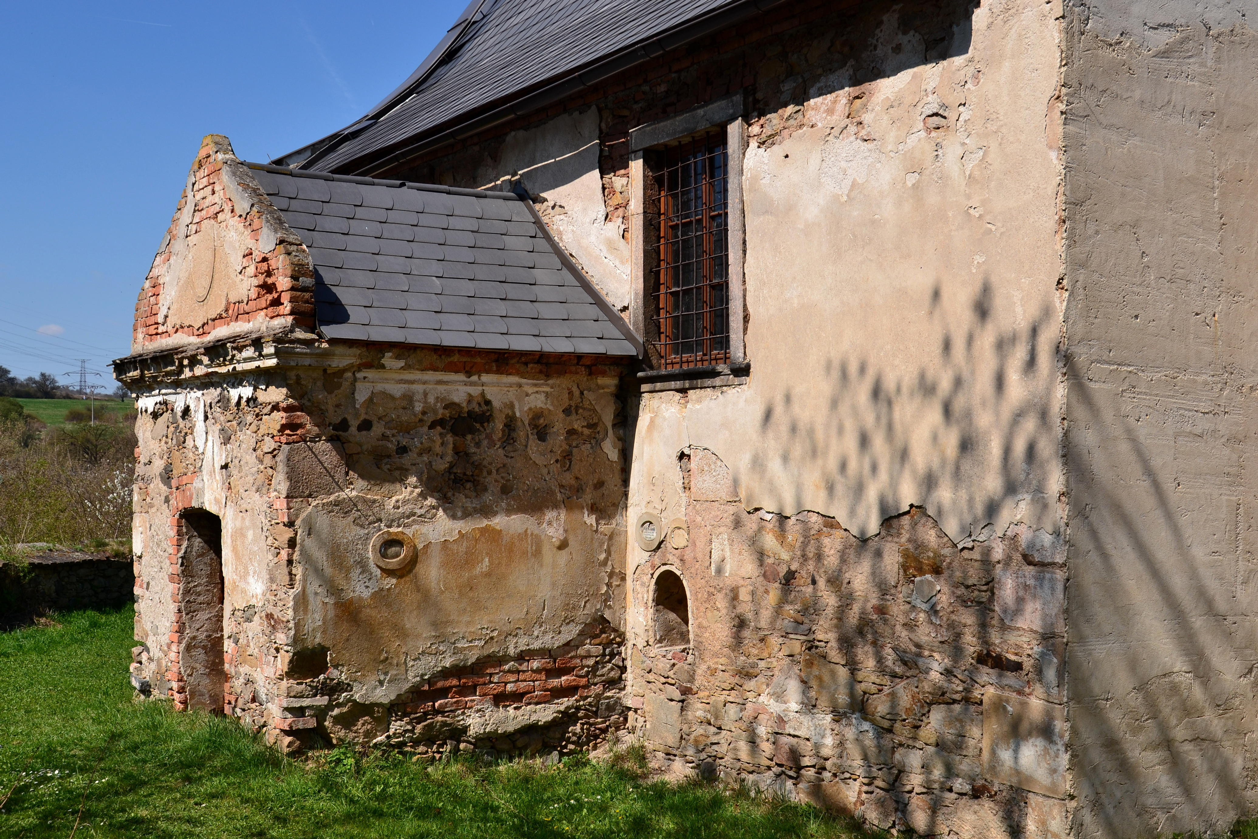 Předsíň, Kostel svatého Vavřince, Želina.